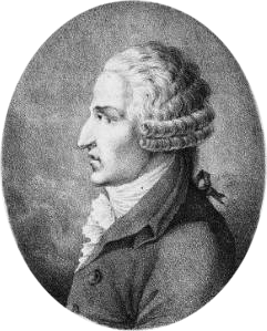 Italian composer Pasquale Anfossi